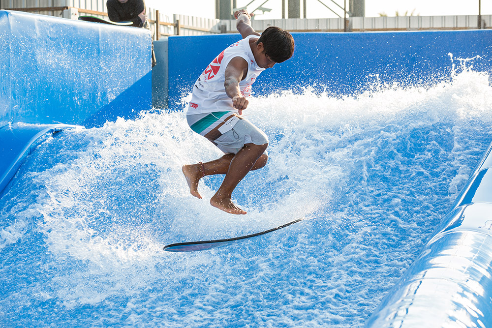 เซิร์ฟ อารีน่า